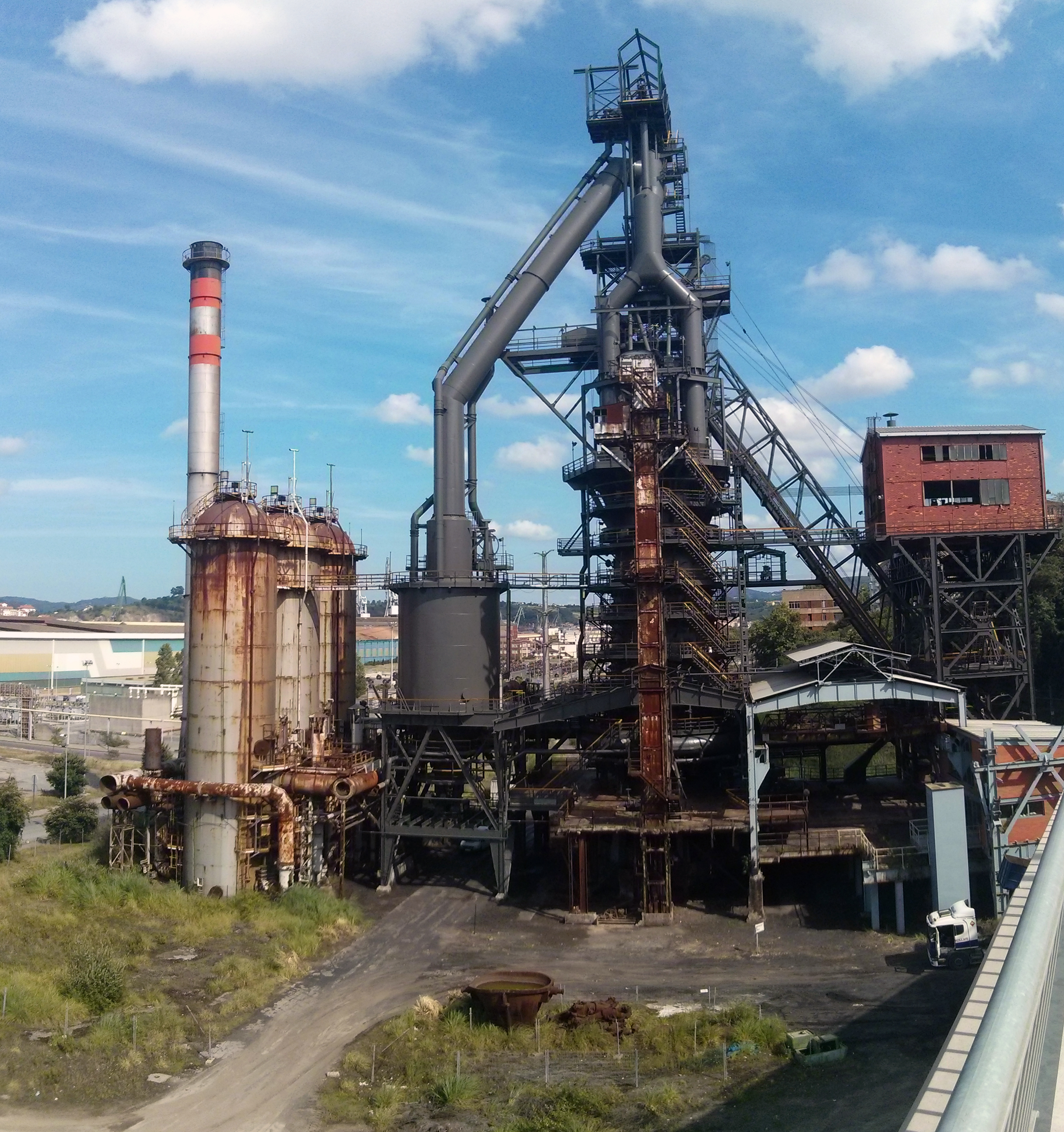 Sestaoko "Altos Hornos de Vizcaya"-ko enpresaren Maria Angeles labe garaia. Egun zutik gelditzen den bakarra.